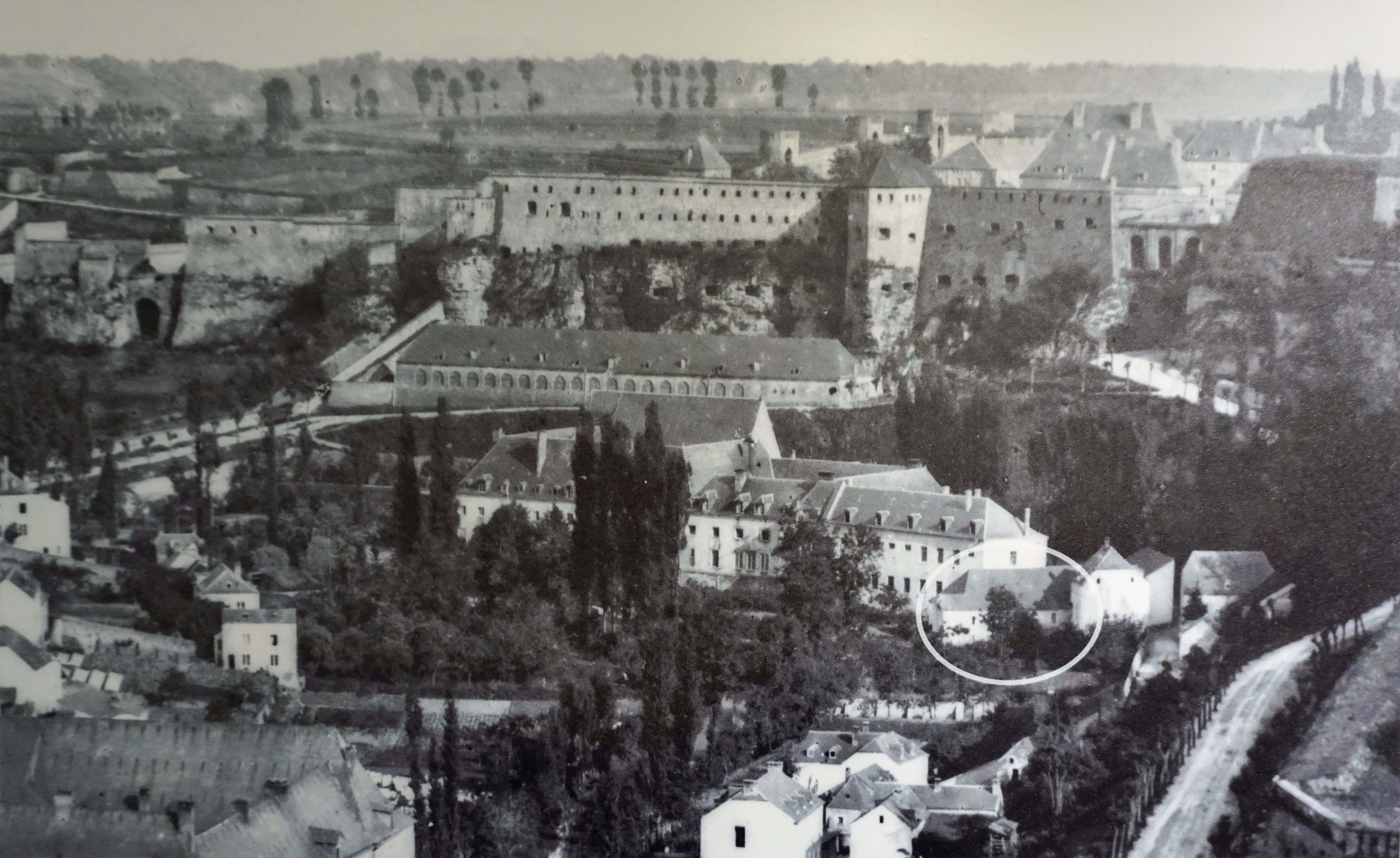 Luxembourg, vue sur le quartier Pfaffenthal. L'ancien moulin Muerbelsmillen est encerclé.